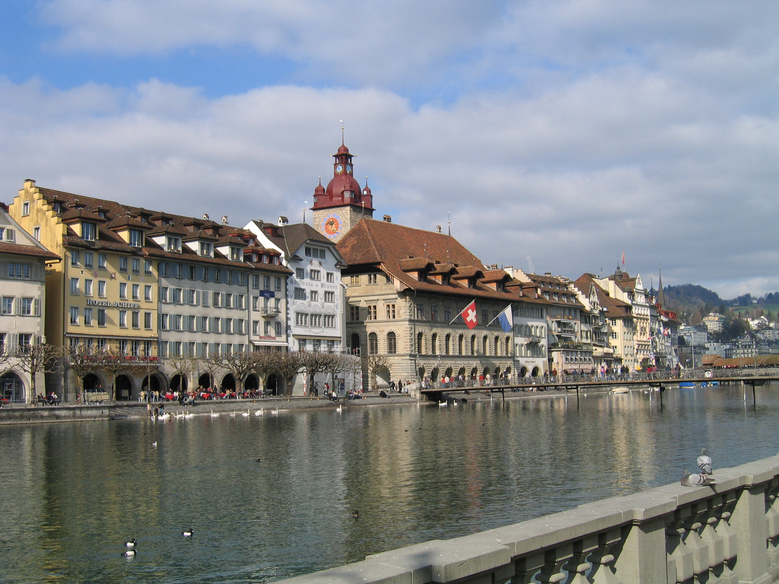 Luzern